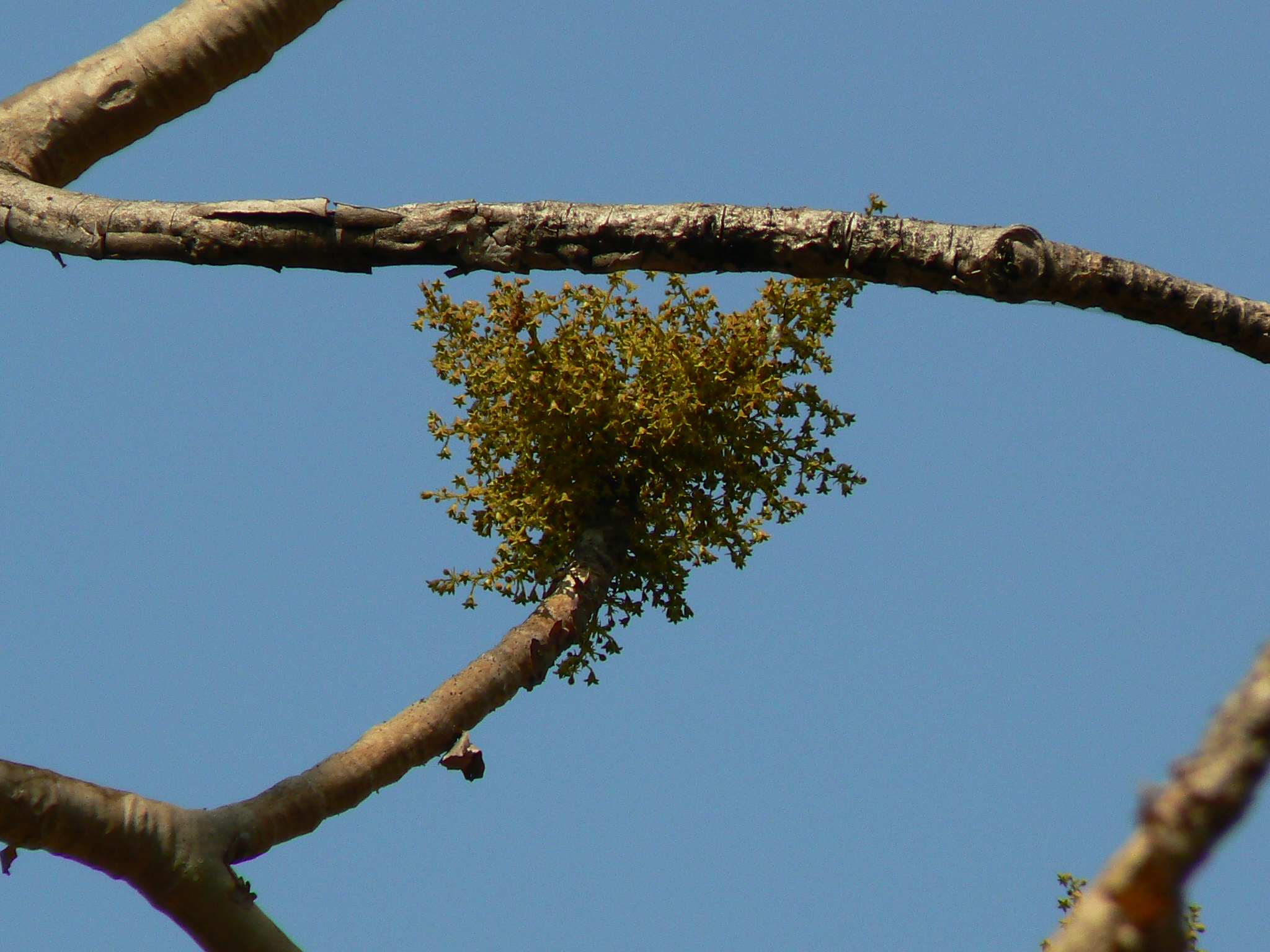 Sterculiaceae (cacao family) » Sterculia urens stur-KEW-lee-uh -- named after the Latin god Sterculius UR-ens -- meaning, stinging commonly known as: bassora tragacanth, Indian tragacanth, karaya tree • Assamese: odla • Gujarati: કોગડોલ kogdol • Hindi: गुलु gulu, कराया karaya, कतीरा katira, कुलु kulu • Kannada: kempudale, pinari • Konkani: पांडरूख pandrukh • Malayalam: anainar, paravakka, theethondi • Marathi: कांडोळ kandol, कावळी kawali • Oriya: gudalo • Rajasthani: katila • Tamil: குதிரைப்பிடுக்கன் kutiraippitukkan, செந்தணக்கு centanakku, வெல்லை பூத்தாளி vellai-puthali • Telugu: తపసి ట్టు tapasi chettu Native of: India References: Flowers of India • Top Tropicals